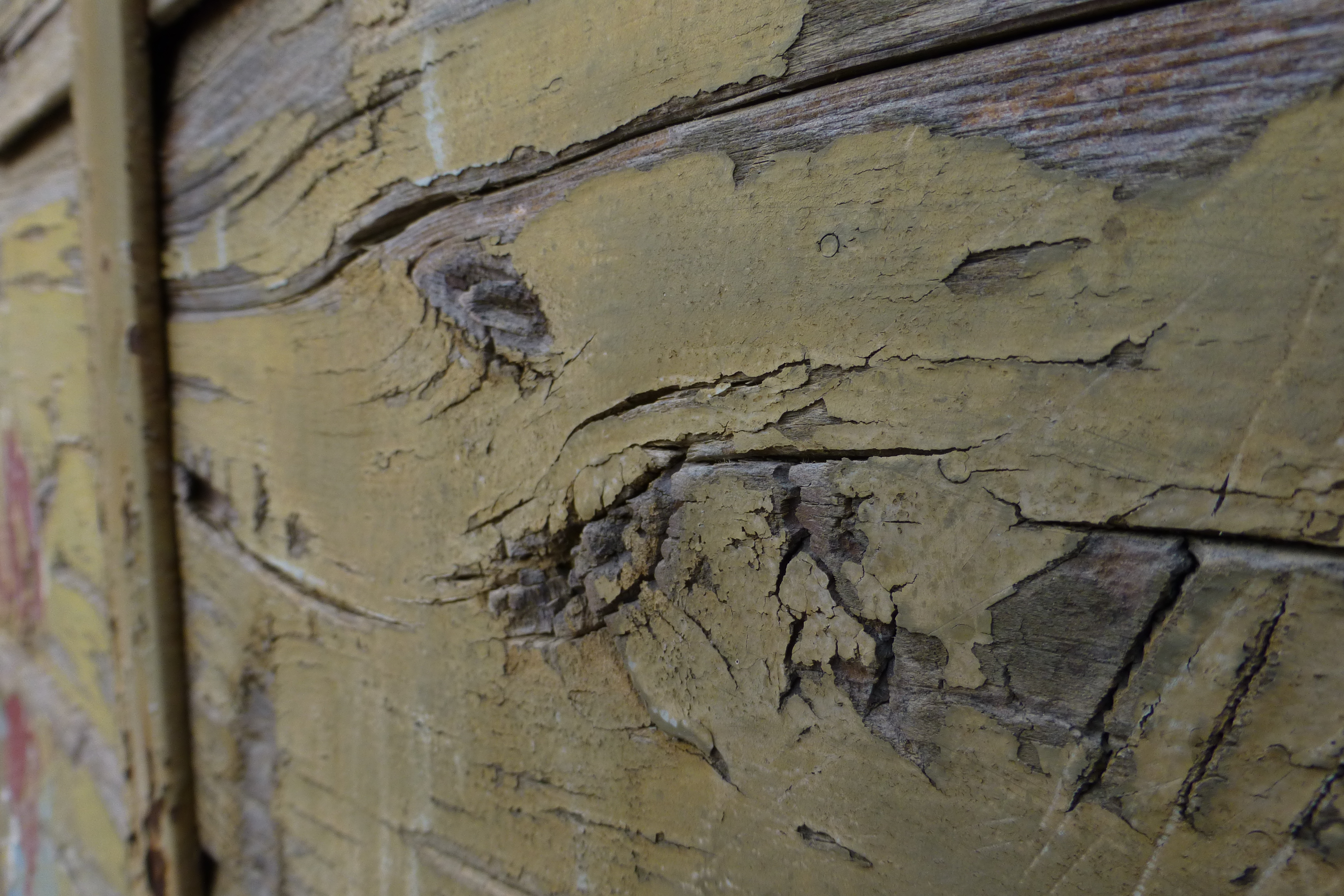 בית המסילאים תחנת רכבת יגור